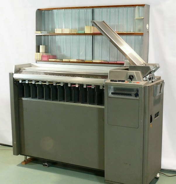 Der IBM Lochkartensortierer Modell 083, gebaut ab 1958